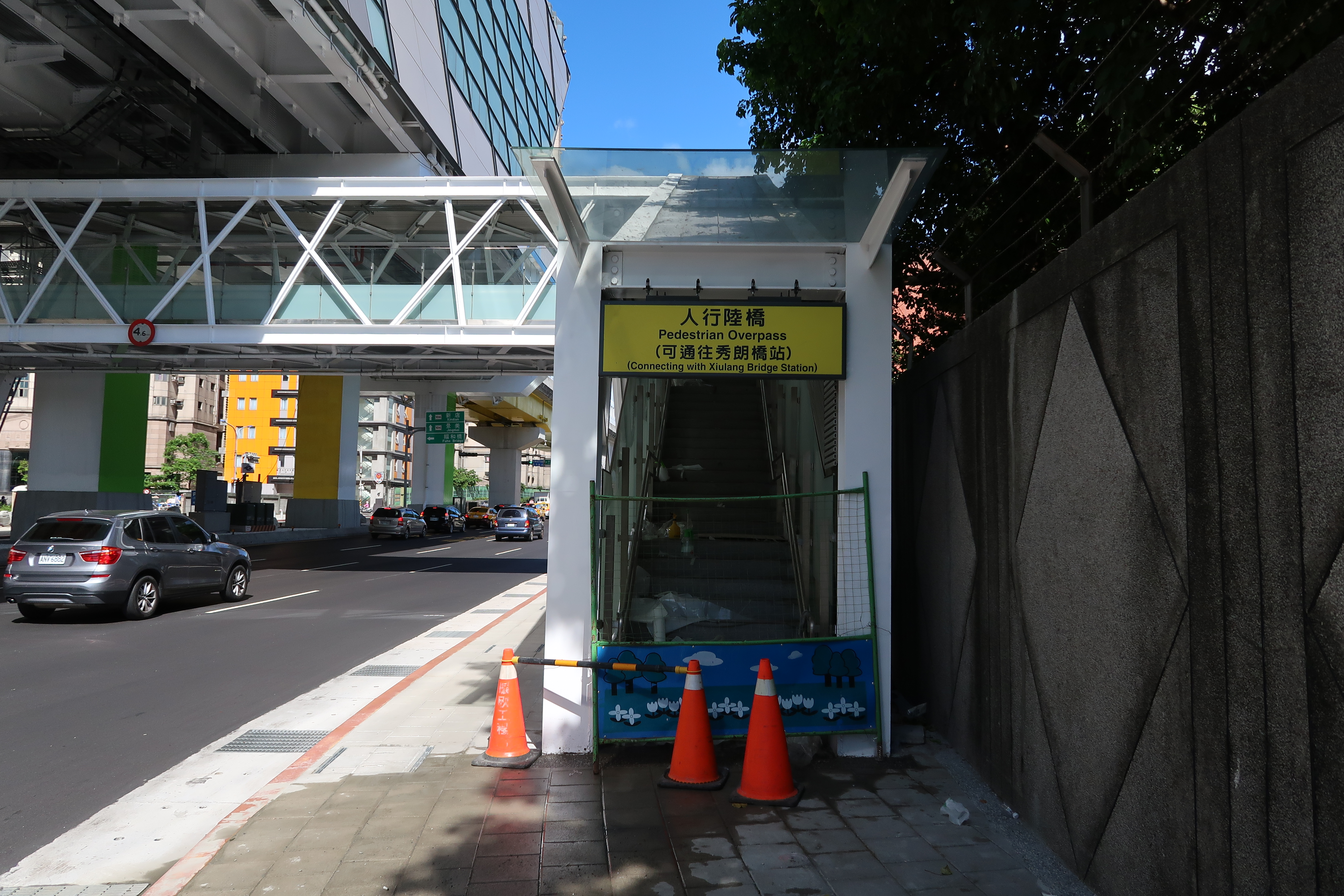 新北市中和區景平路，施工中的台北捷運秀朗橋站南側連通天橋出口。